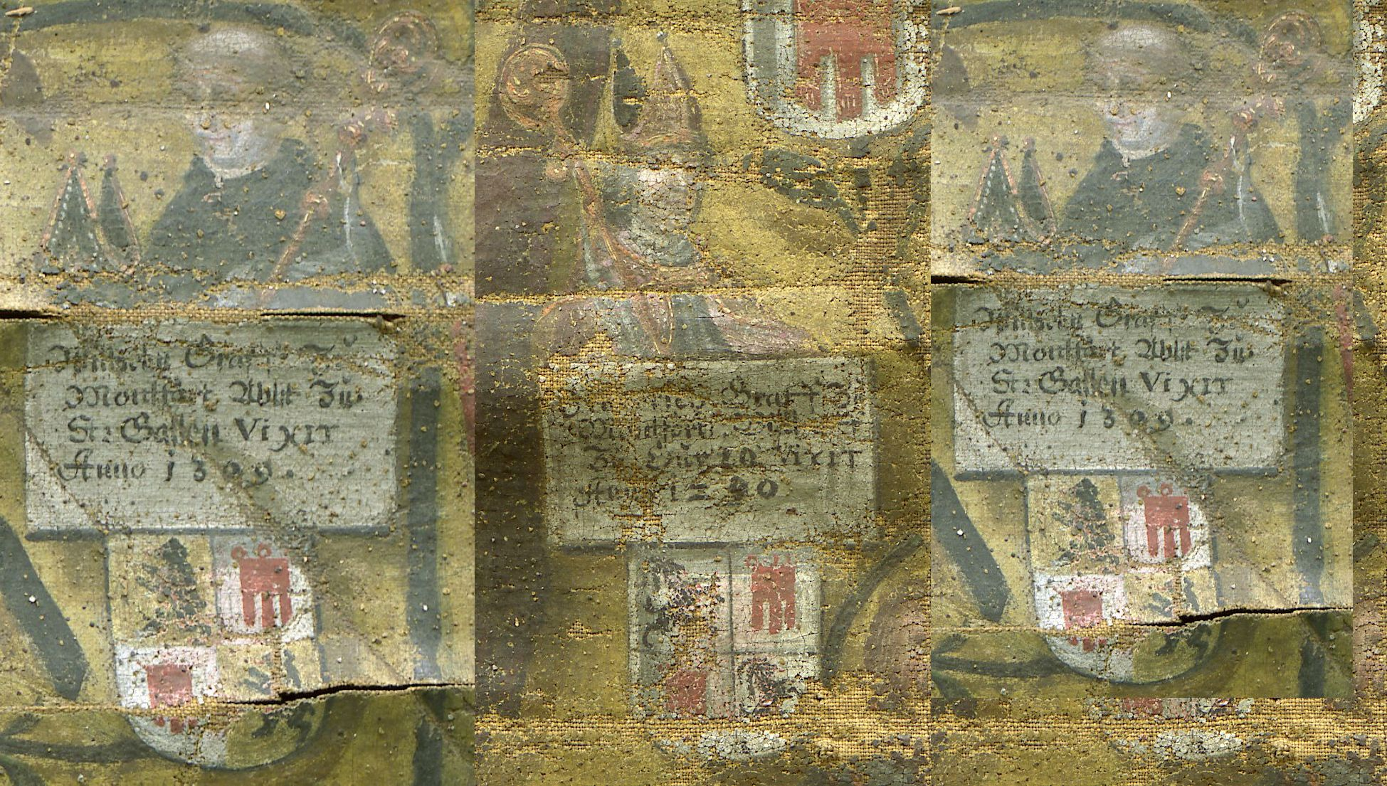 Die Brüder Friedrich II. († 1290, links), Heinrich III. († 1307, Mitte) und Wilhelm I. v. Montfort († 1301, rechts) hatten hohe geistliche Ämter inne. Friedrich und Heinrich amtierten im 13. Jahrhundert als Bischof bzw. Dompropst von Chur, Wilhelm war als Fürstabt von St. Gallen in die politischen Wirren des Interregnums verwickelt. Offensichtlich falsche Beschriftung einer fototechnisch zusammengestückelten Abbildung! Nur Friedrich II. († 1290), auf dem Bild in der Mitte ist richtig beschrieben. Links und rechts zweimal die selbe Person mit Sterbedatum 1399.